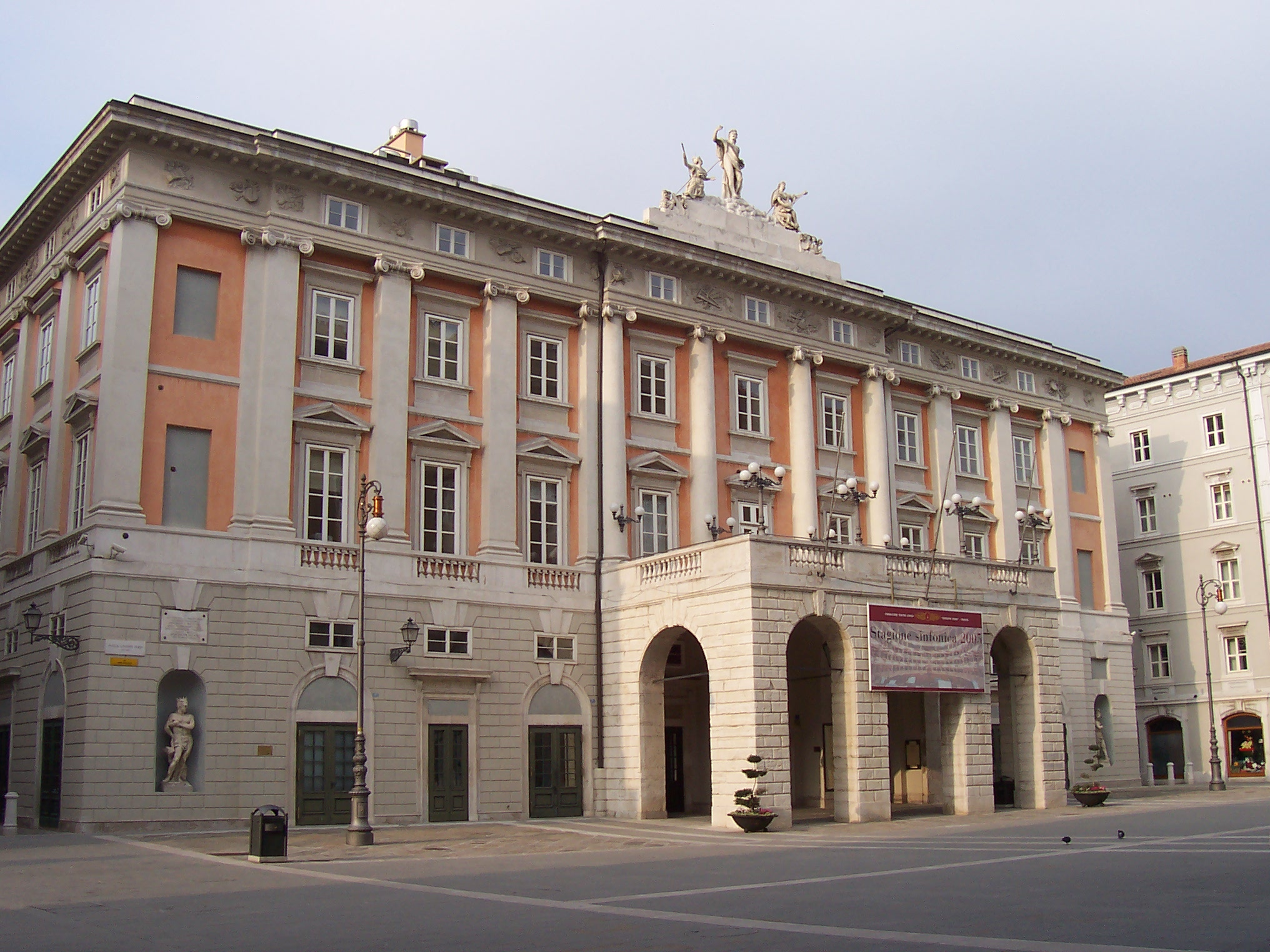 Palazzo Verdi Teatro in Trieste, Italy